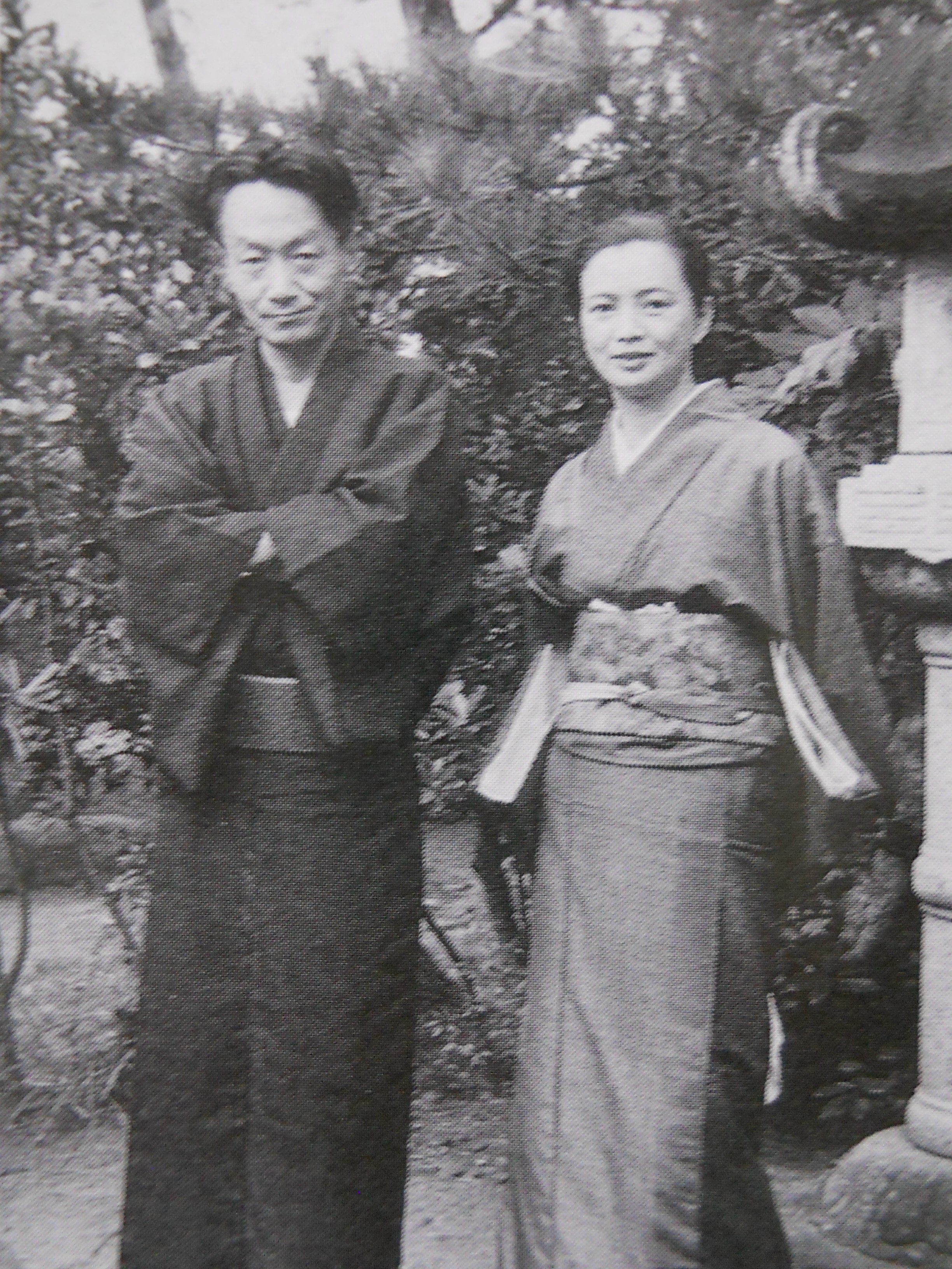 Oooka Syouhei and Wife